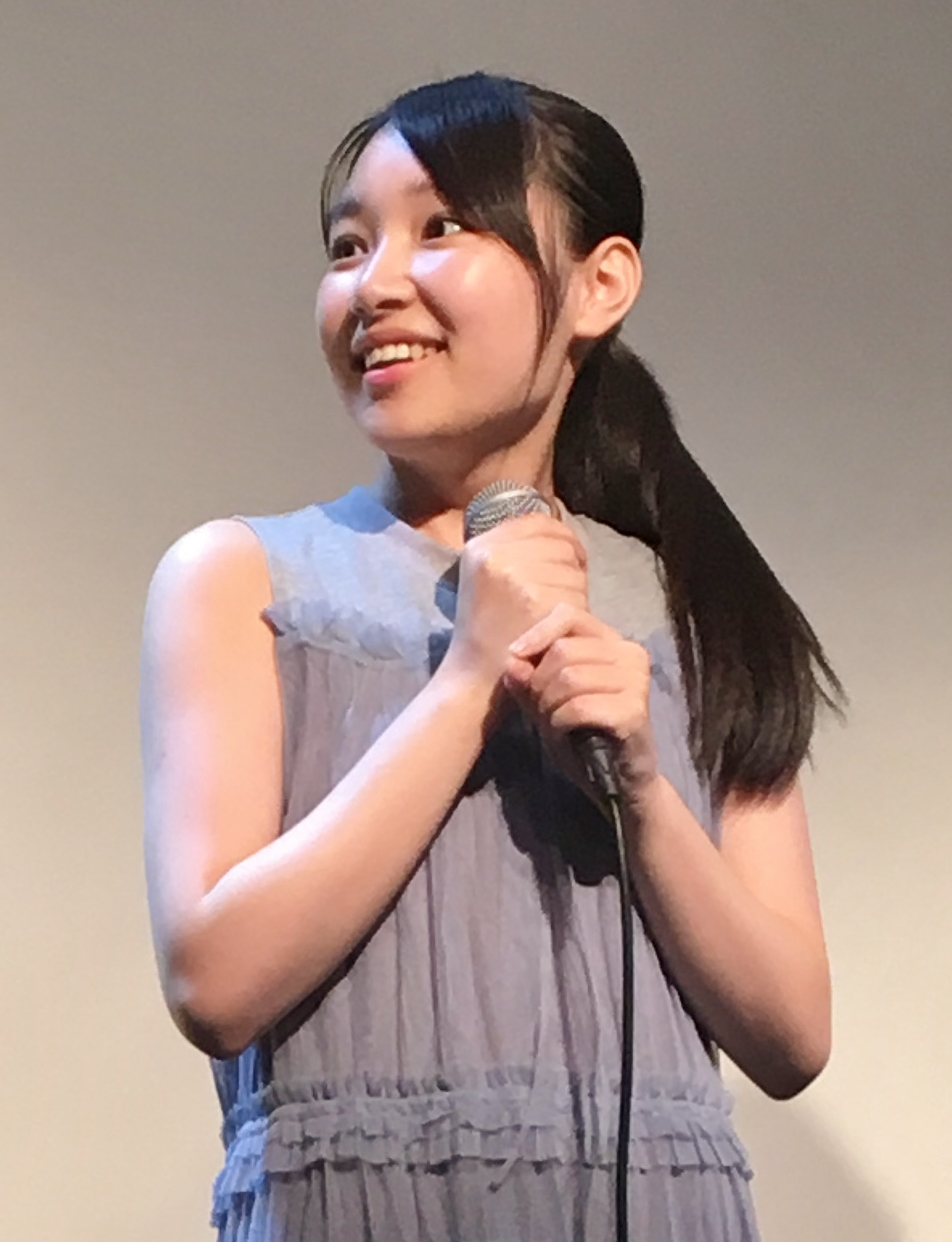 白石優愛（2018年8月8日、LOFT9 Shibuya）